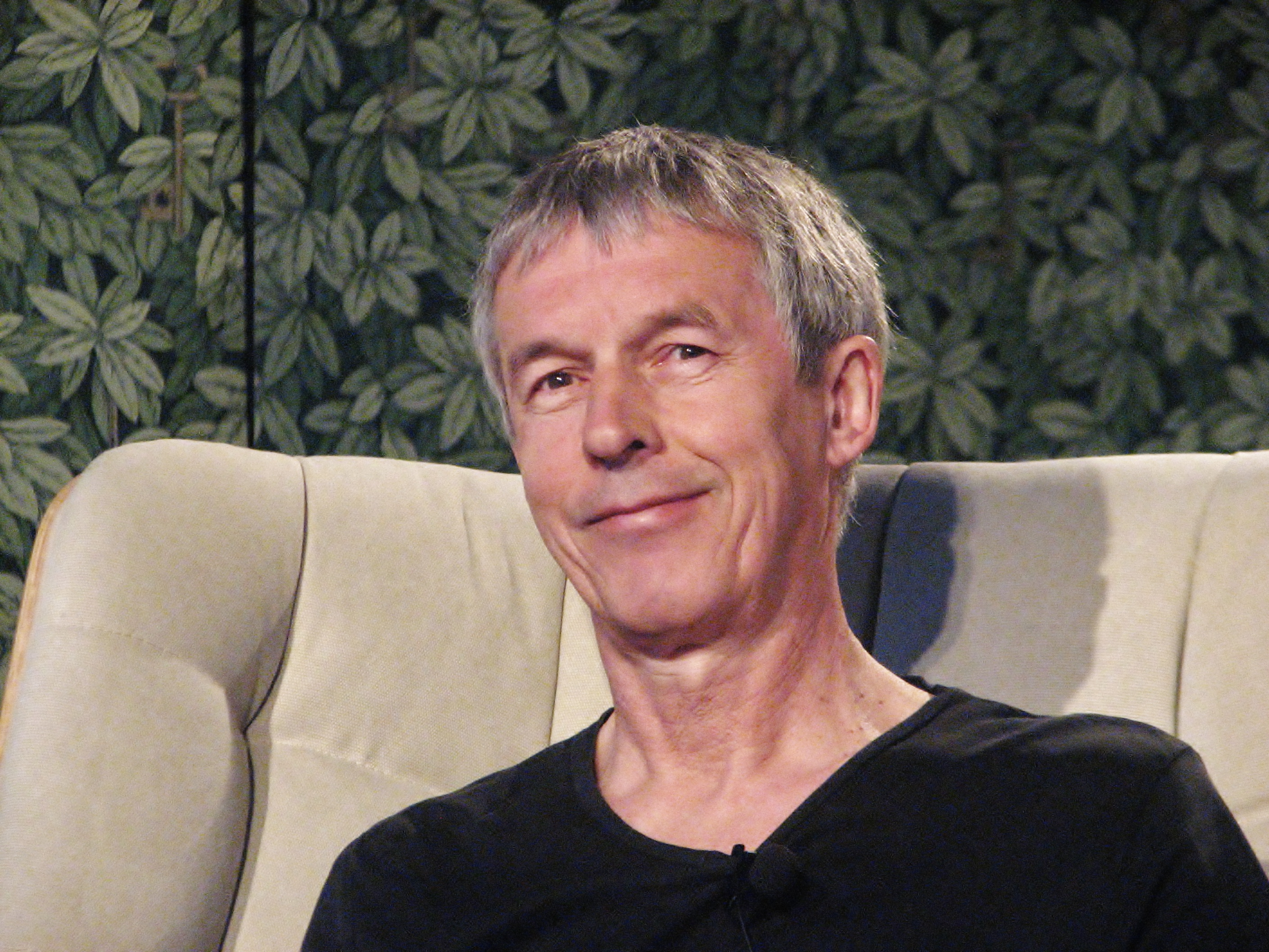 Jean-Claude Mourlevat esinemas HeadReadil Tallinna kirjanike maja musta laega saalis